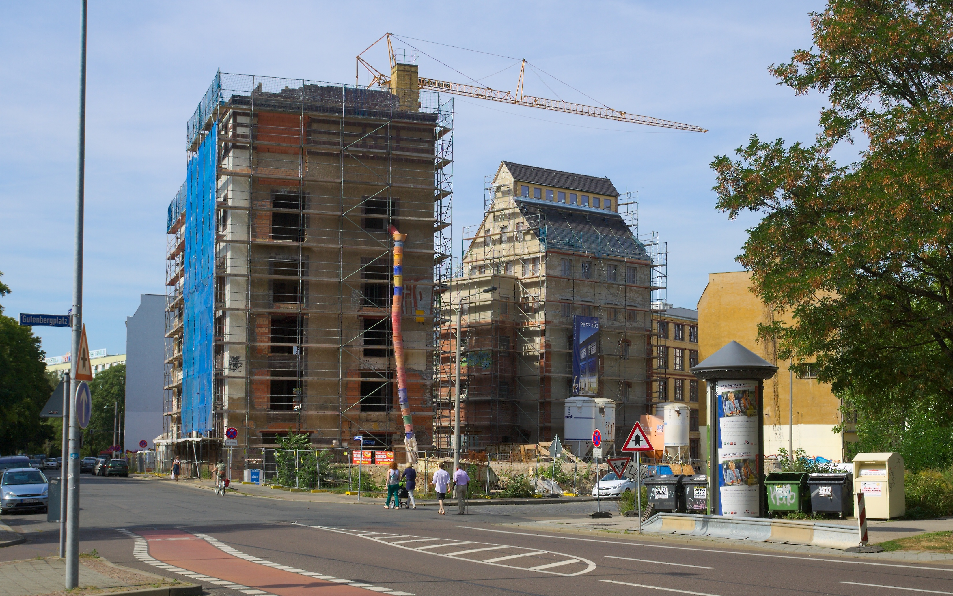 Bauarbeiten auf dem Gelände der ehemaligen Brauerei Ernst Bauer in Leipzig, 9.September 2012.